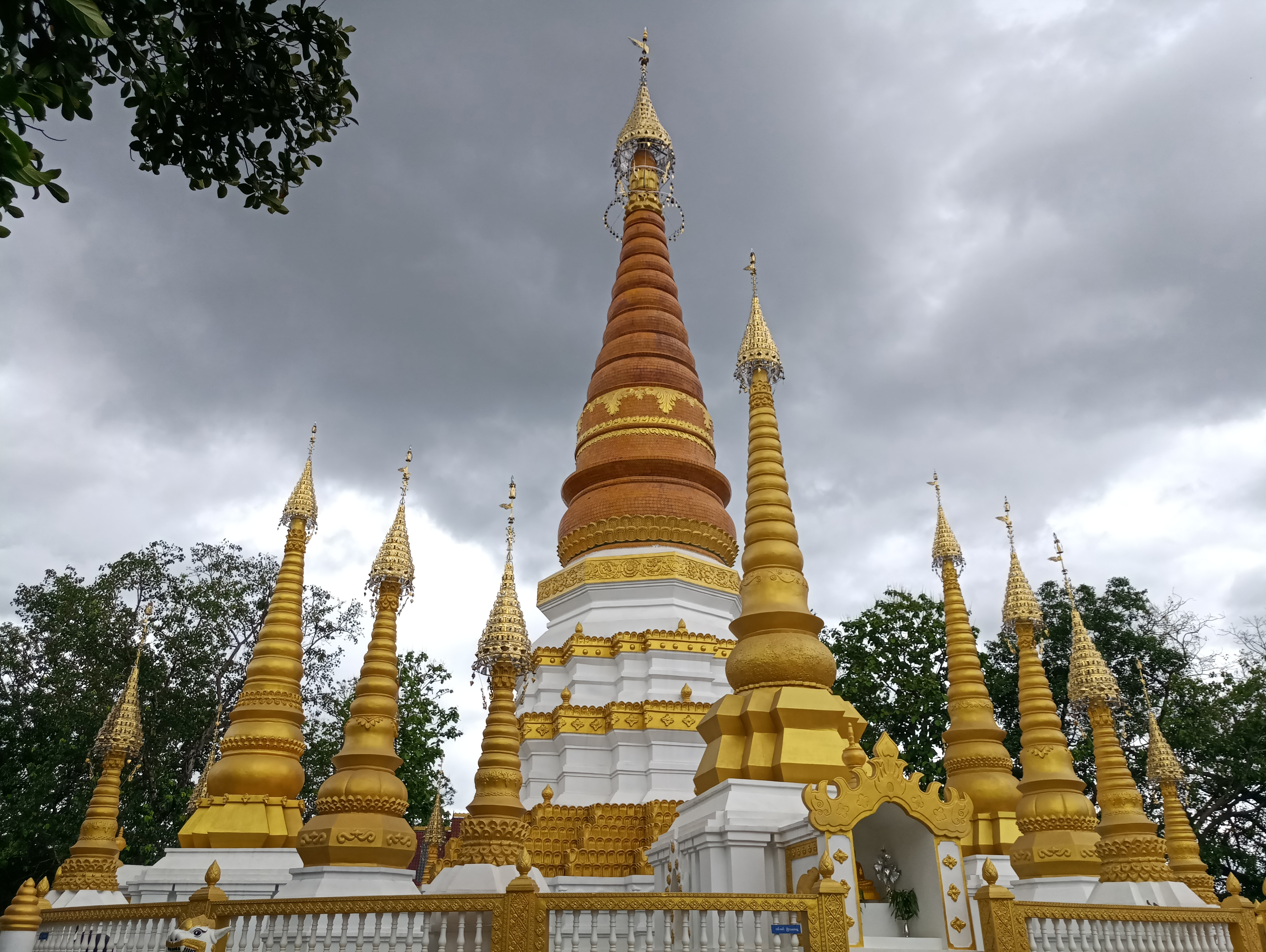 中文（中国大陆）: 姐勒金塔主塔